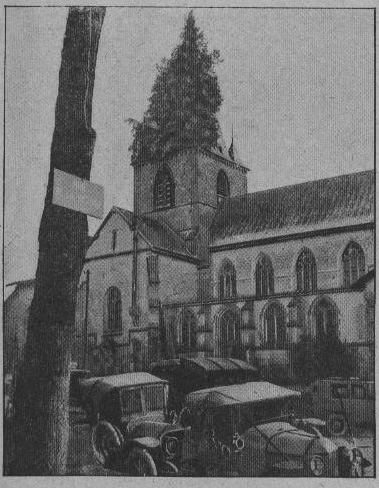 l'église de Somme Suippes en 1916. Elle servait alors d'infirmerie.